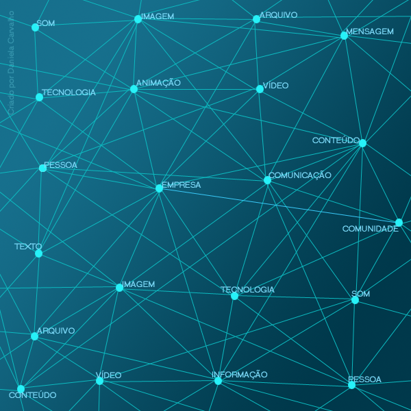 Hipertexto: a base fundamental da comunicação interativa.